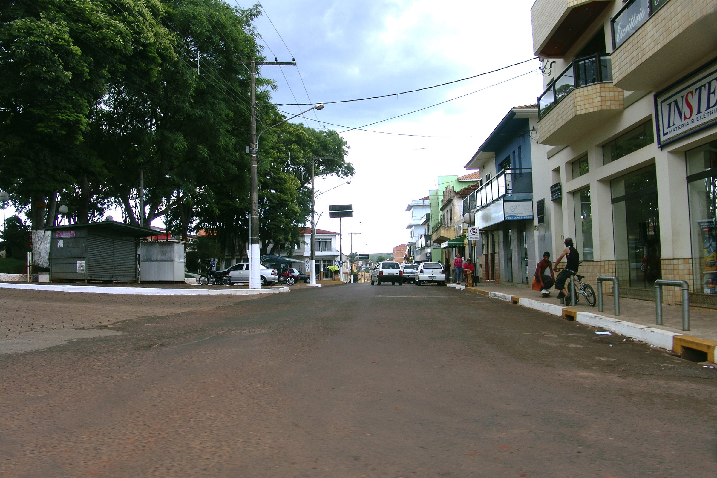 Município de Itaberá, São Paulo, Brasil